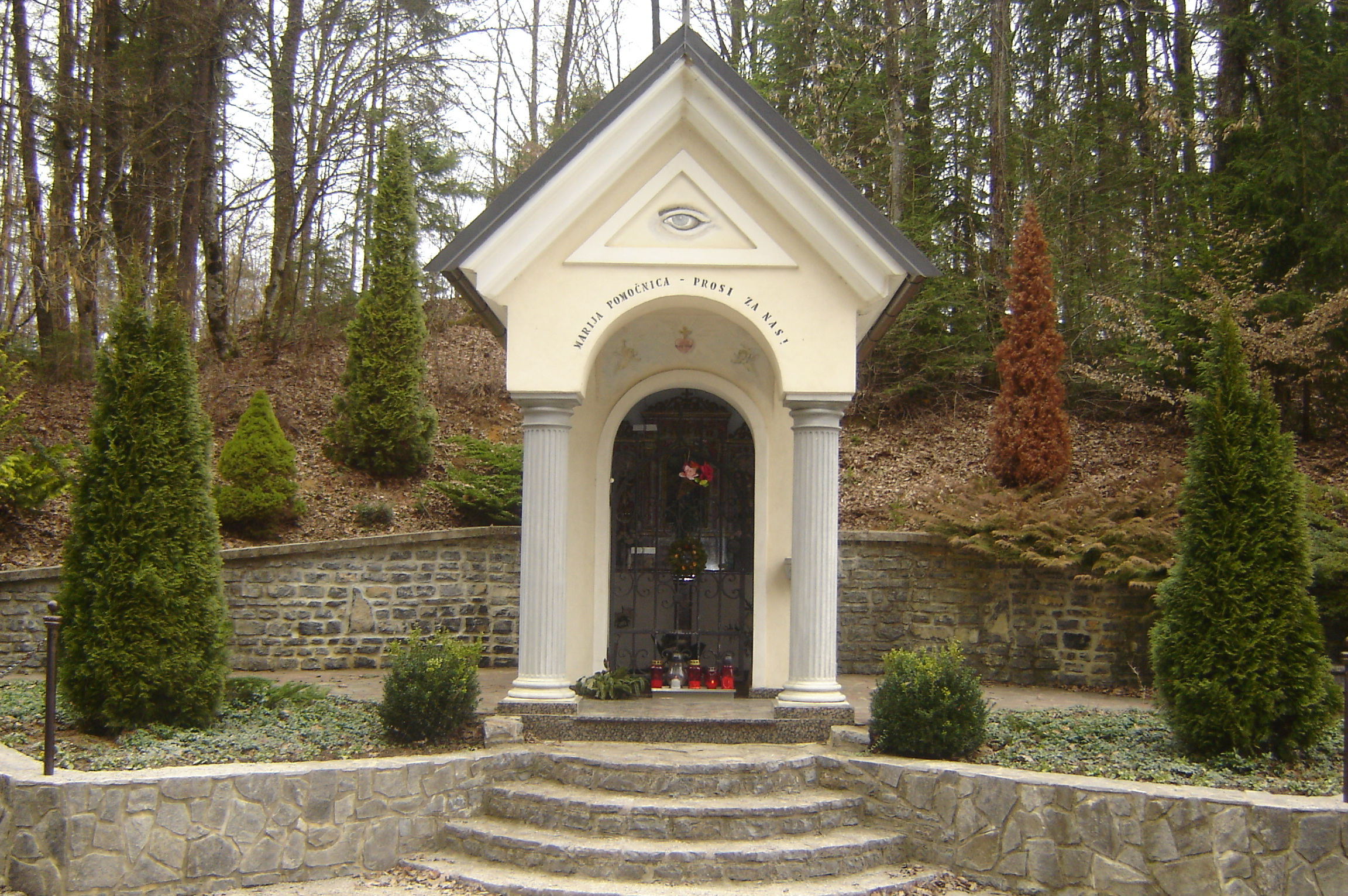 Dob pri Šentvidu, ena izmed treh vaških kapel.